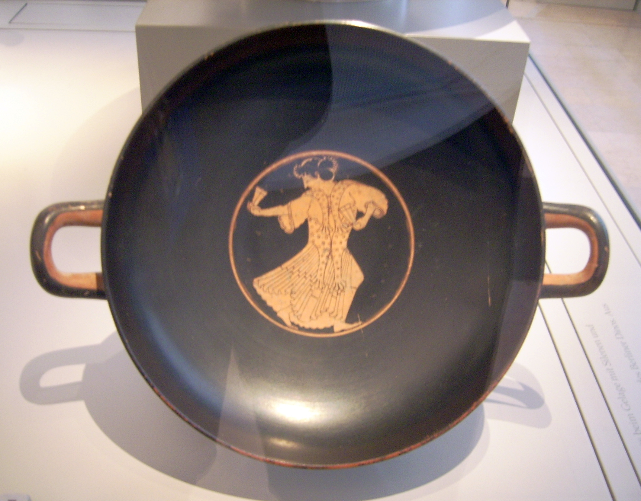 Tanzende Mänade, attisch-rotfigurige Trinkschale (Kylix), dem Pedieus-Malers zugeschrieben, 520/10 v. Chr., Antikensammlung Berlin/Altes Museum